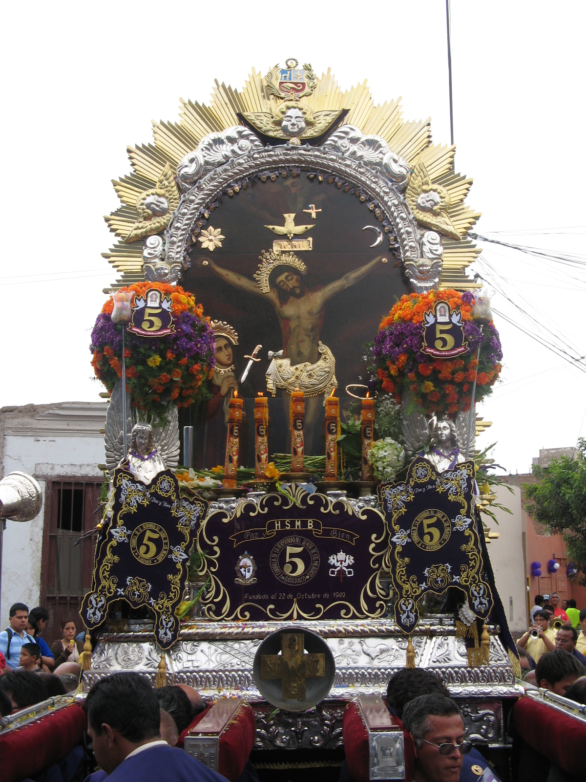 Señor de los Milagros de Barranco